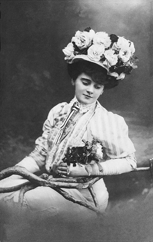 Medgyaszay Vilma – színésznő, színházigazgató. Sanzonénekesnőként tűnt fel a magyar kabaré hőskorában, 1913–1915 között a Modern Színpad vezetője volt.